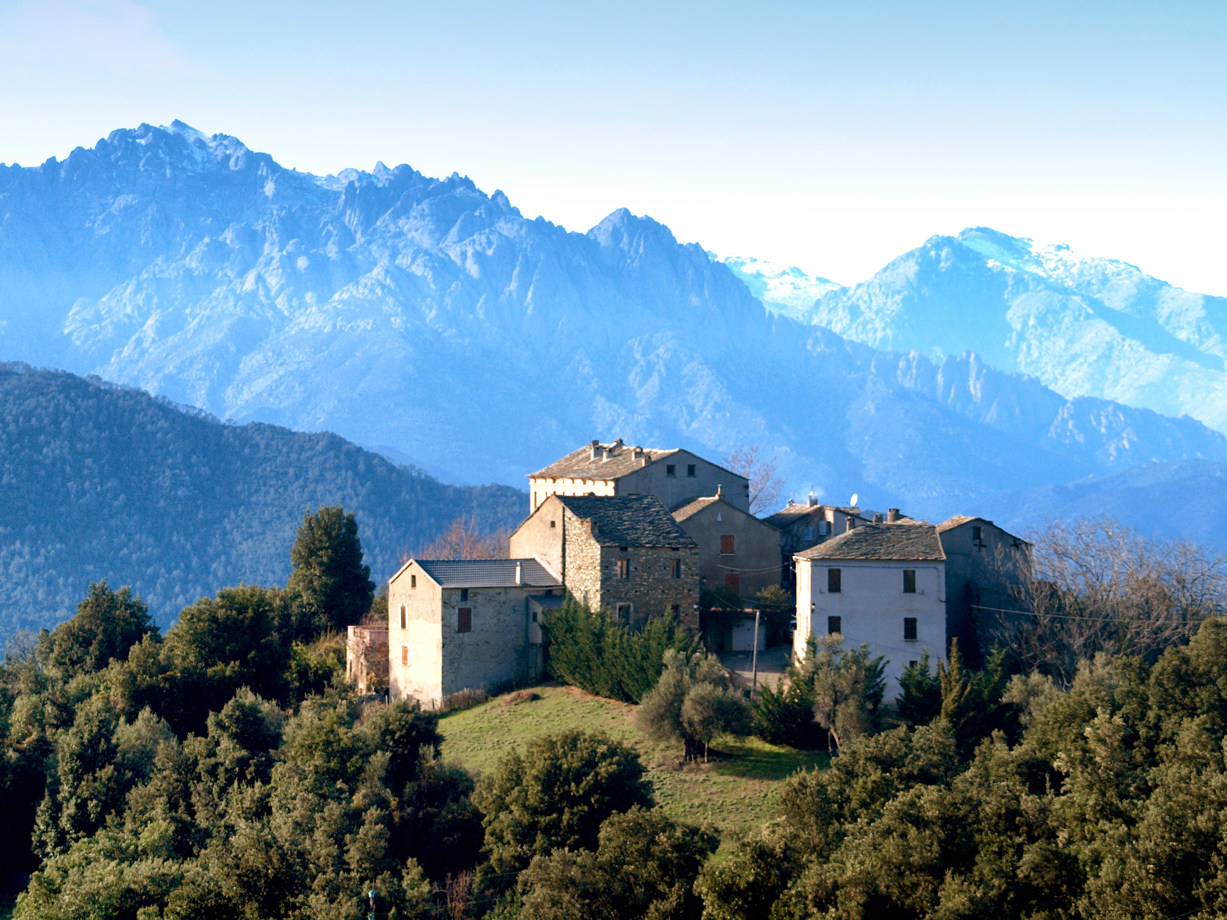 Gavignano, Castagniccia (Haute-Corse) - Le hameau de Borgo. À l'arrière-plan, les aiguilles de Popolasca avec à droite le Monte Padro.